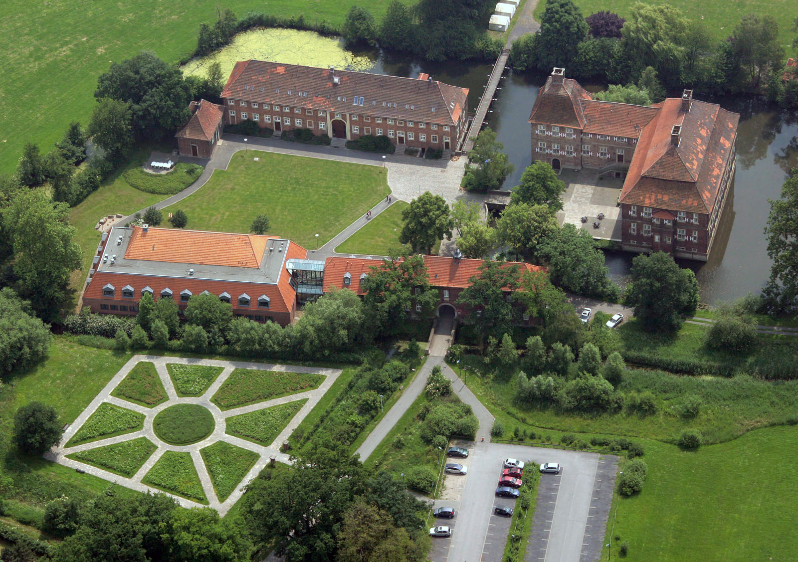 Luftbildaufnahme Hamm, Schloss Oberwerries